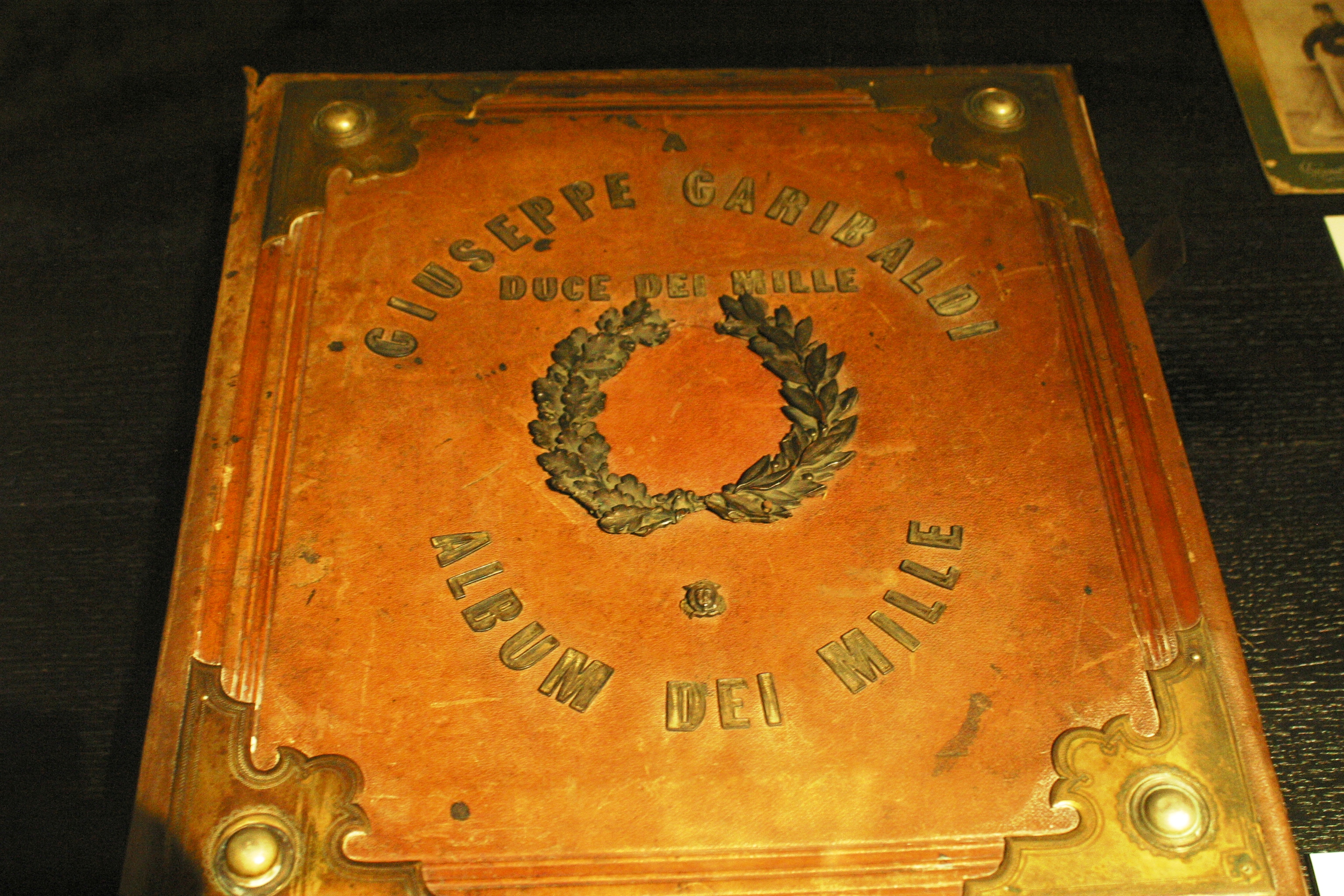 Album dei Mille nel museo degli Italiani al Vittoriano (Roma)